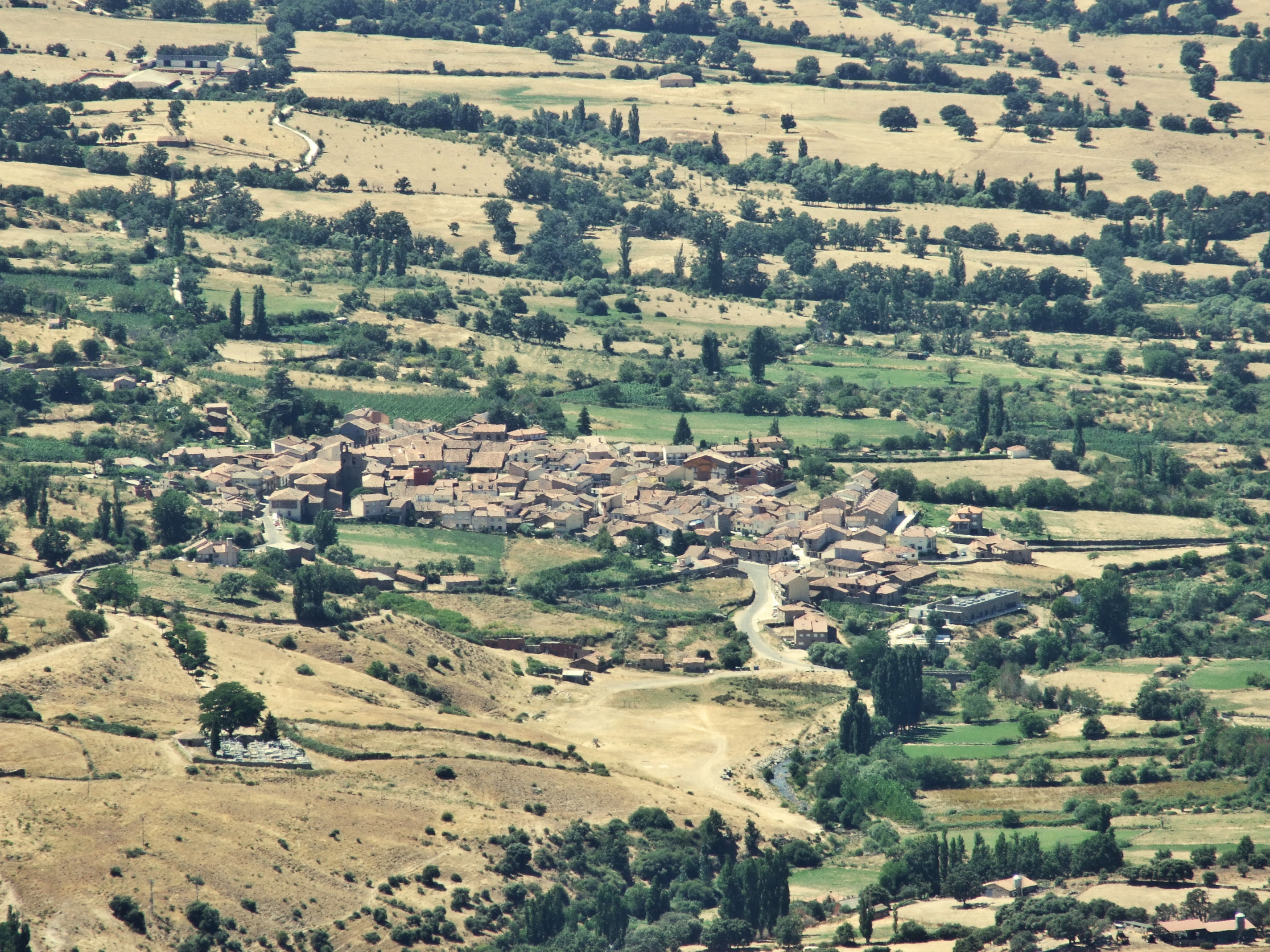 VISTA DE VILLAFRANCA DE LA SIERRA DESDE PEÑA LEVANTE